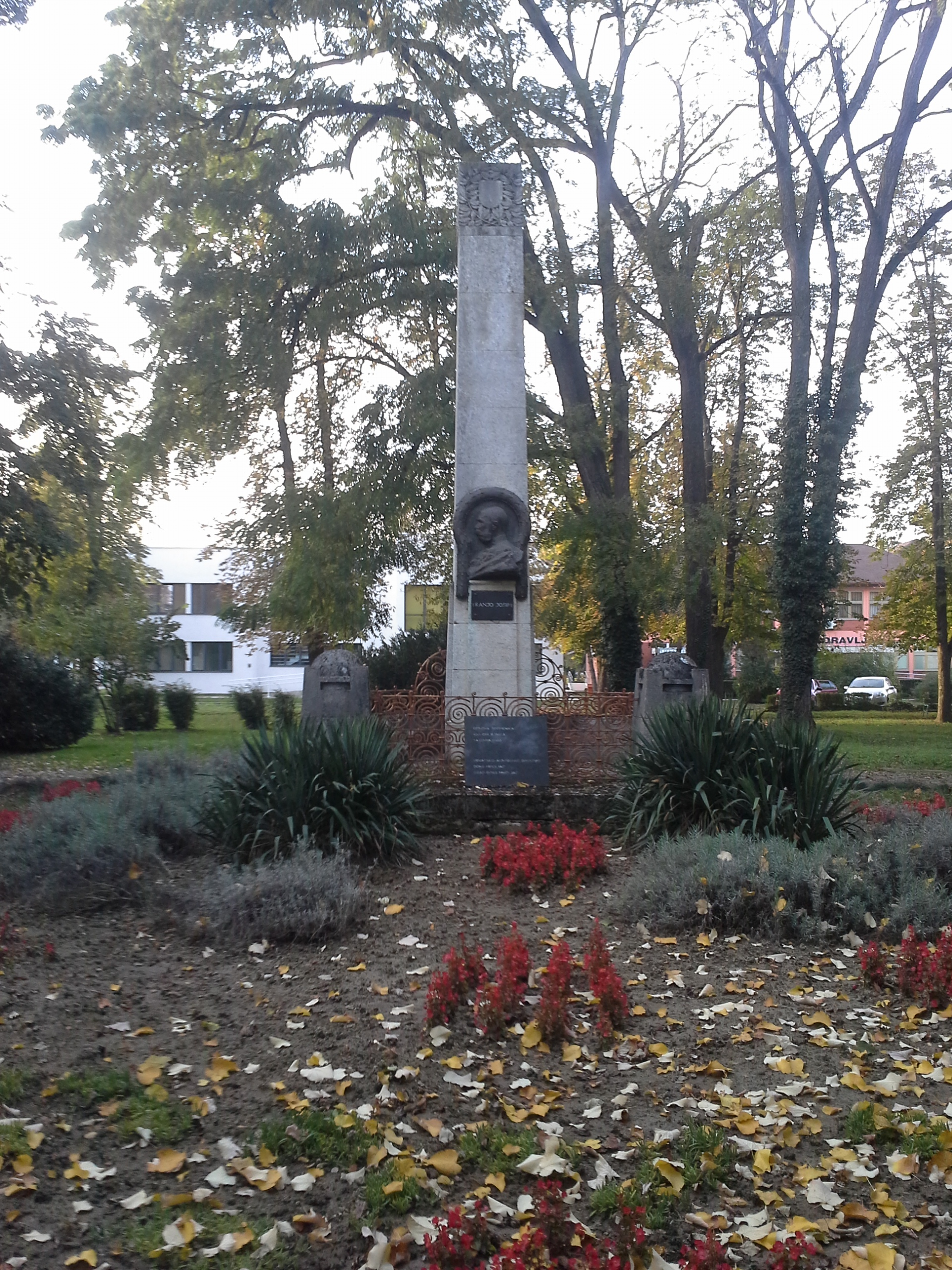 Српски (ћирилица): Donji Miholjac, spomenik cara Franje Josipa I.